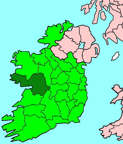 Galway